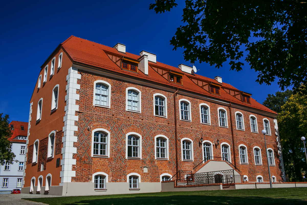 Szczecinek - zamek Książąt Pomorskich zbudowany przez Ulryka darłowskiego, (skrzydło południowe), mur., XV, 1690, XVIII, XX w.